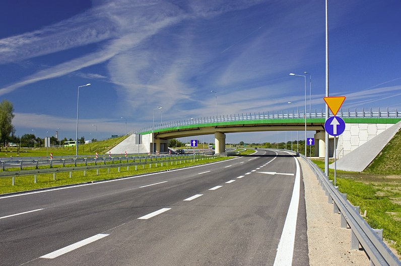 Obwodnica Ełku, okolice węzła Kolonia